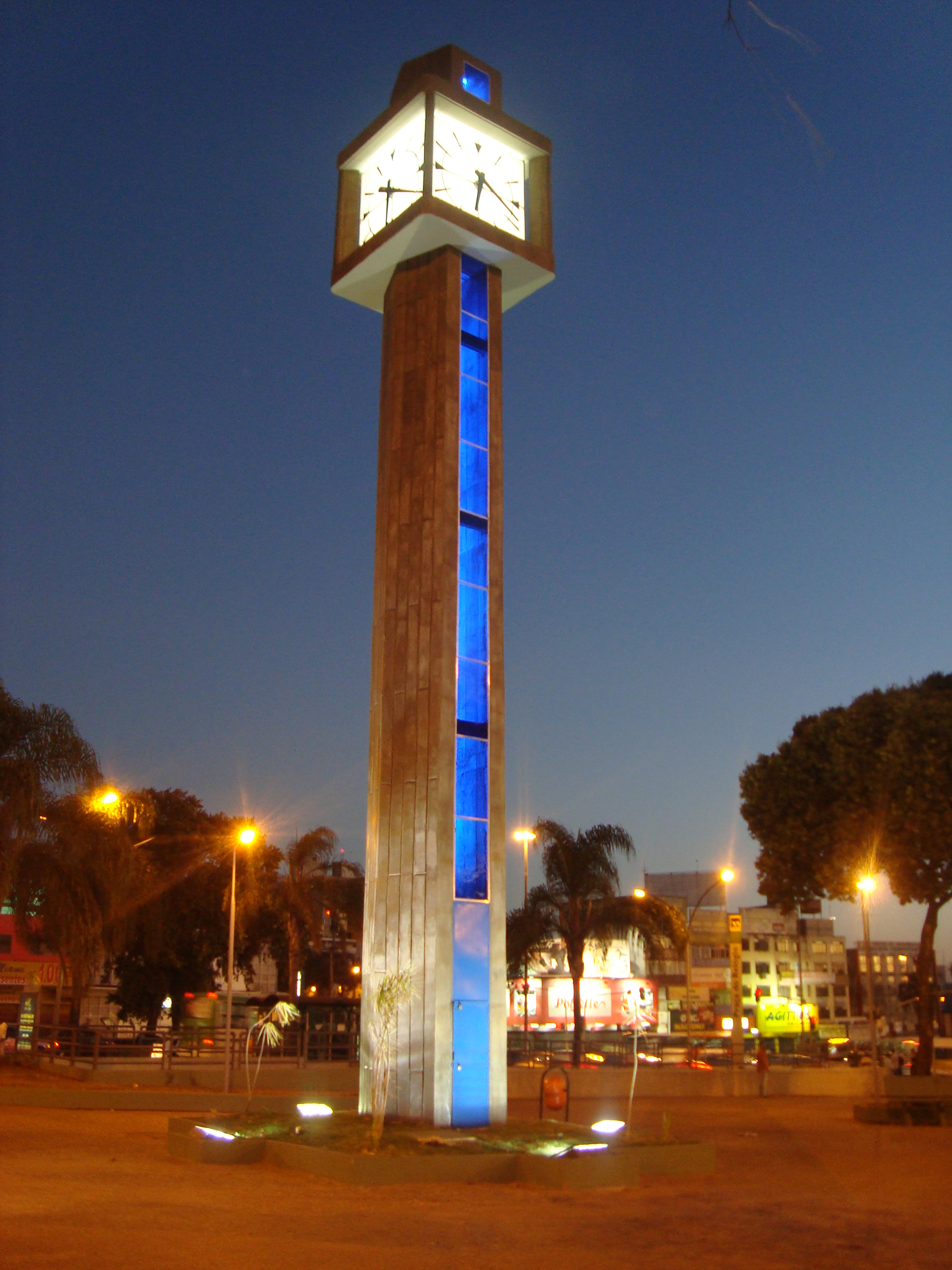 Vista parcial da Praça do Relógio, no centro de Taguatinga, Distrito Federal, Brasil